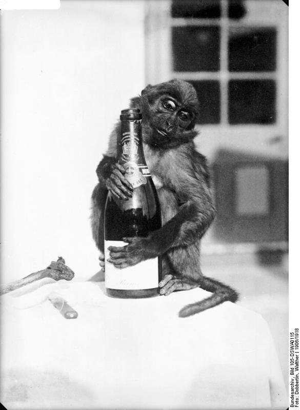 Landsmann beim Sekt